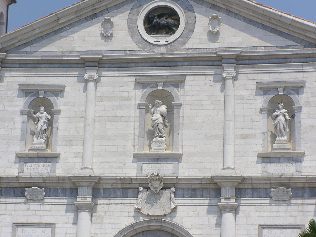 Palmanova